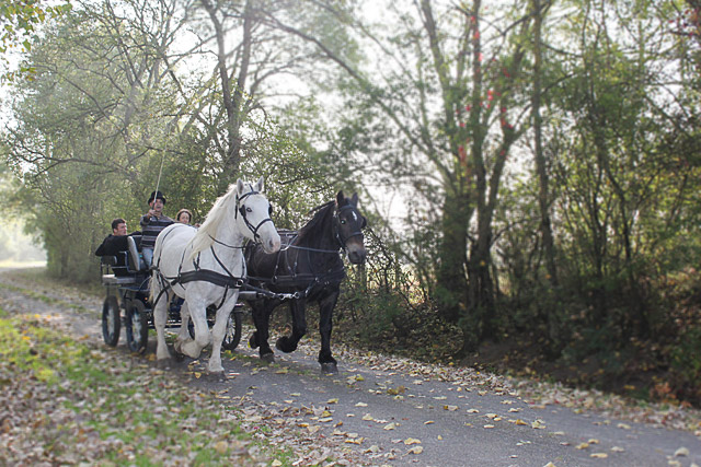 Jean-Max Manceau et ses deux percherons